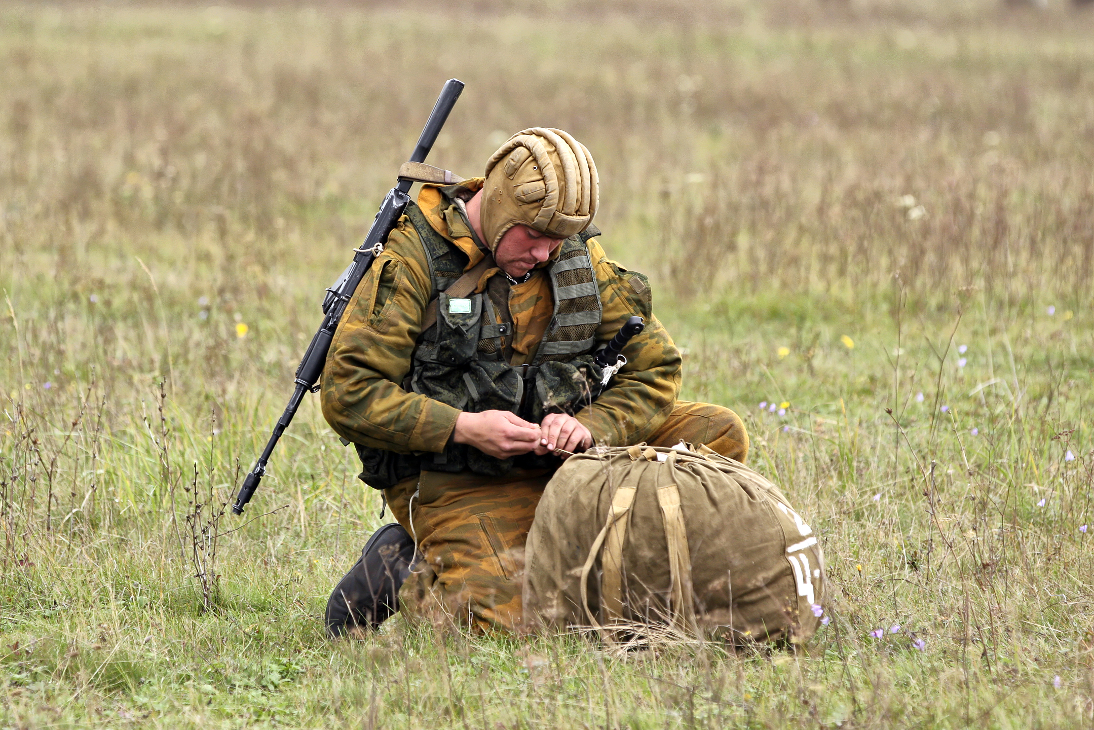 В боевой обстановке и условиях огневого контакта с противником, естественно, нет времени на сбор имущества полка. (In combat situation, of course, the don't have a time for packing the parachutes)